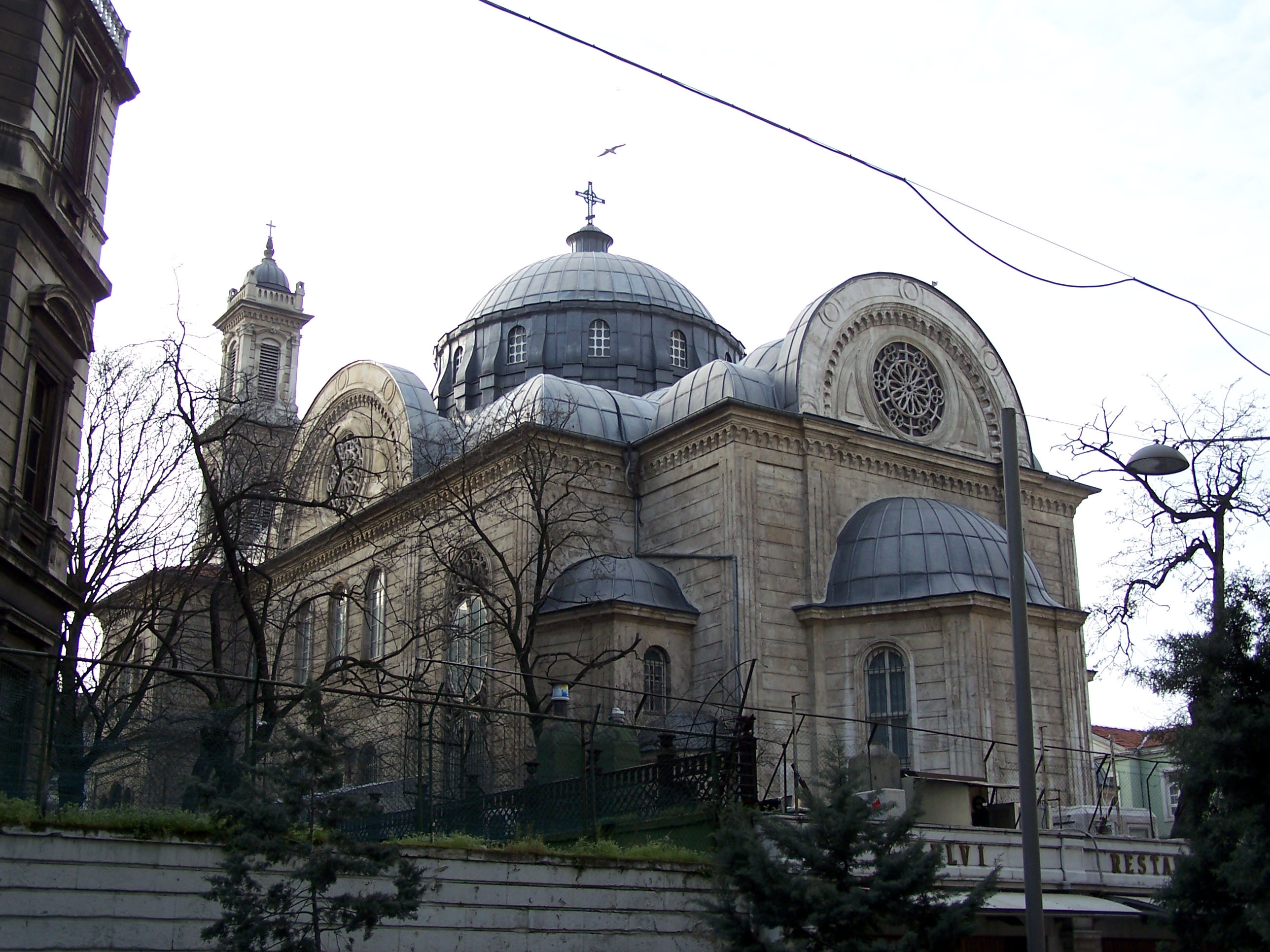 Aya Triada Rum Ortodoks Kilisesi in Beyoğlu, İstanbul, Turkey